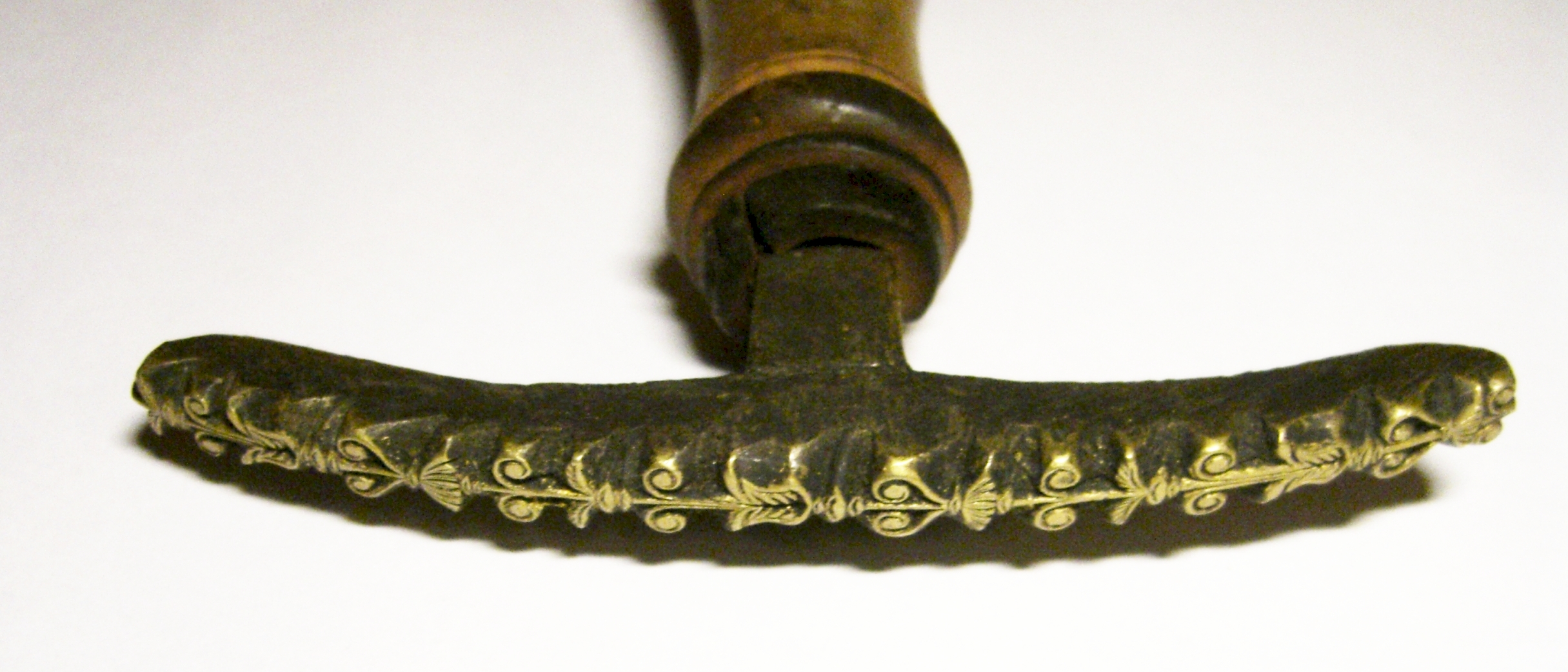 Filete mit Zierornament